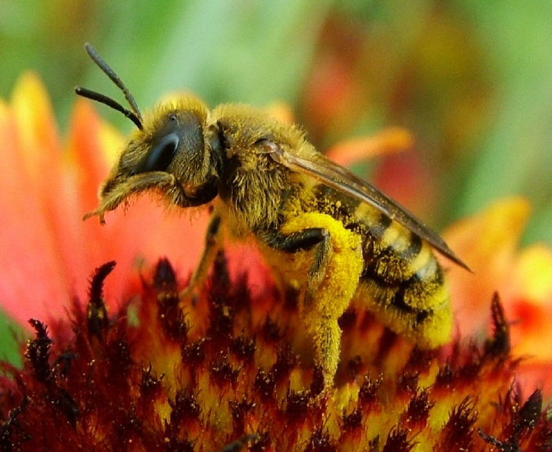 Biene